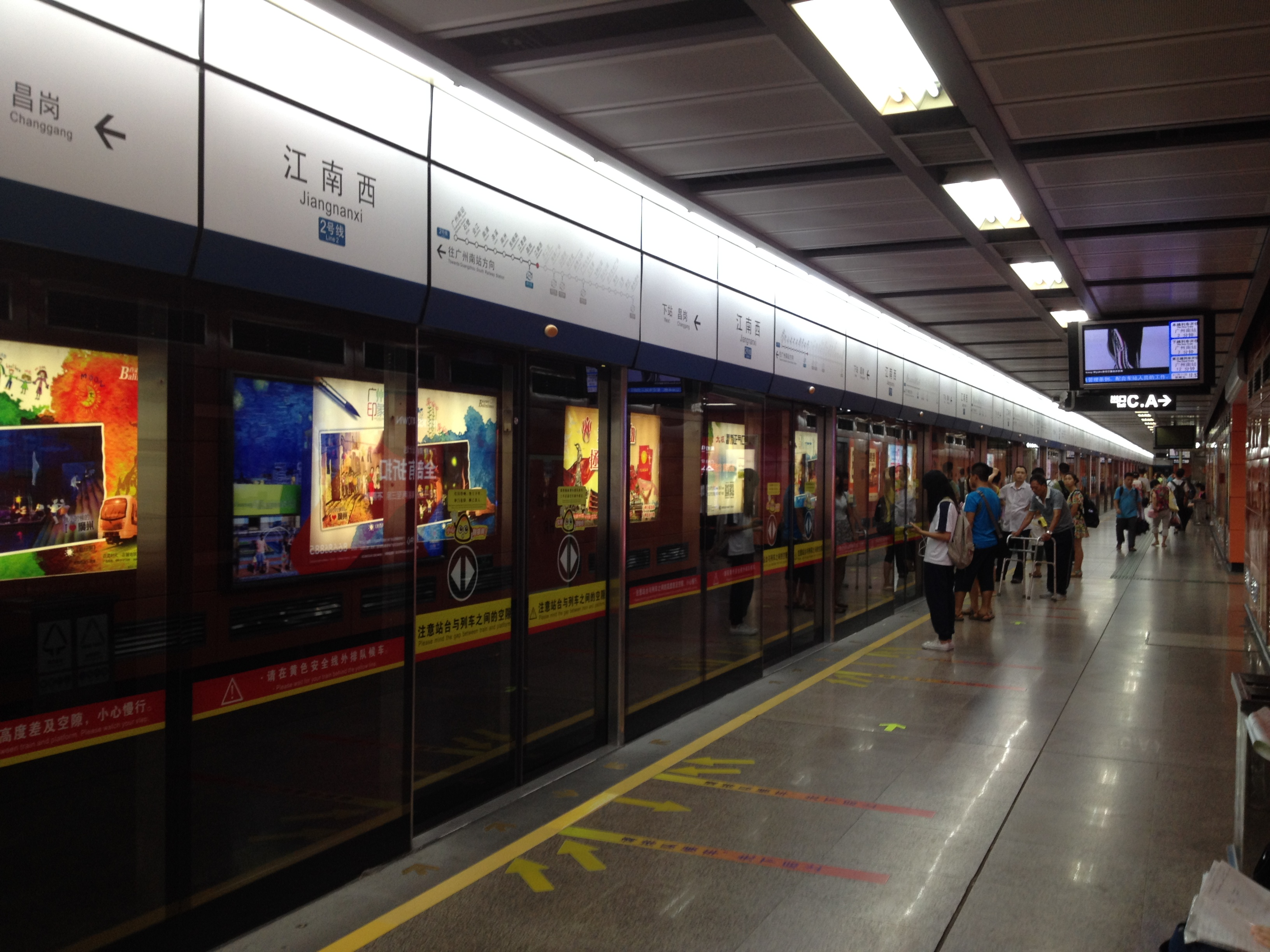 广州地铁江南西站月台（广州南站方向）